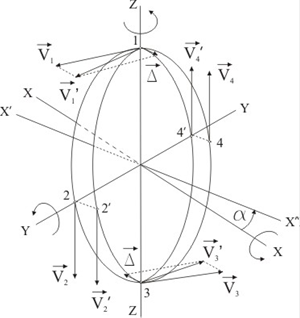 Прецесия на жироскопа